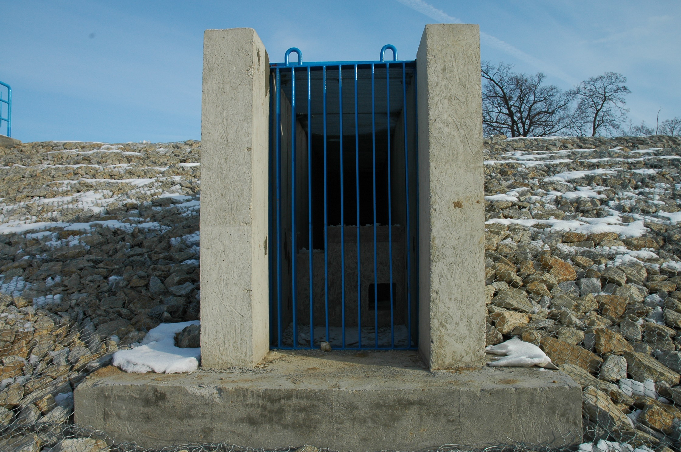 Zapora przeworno wlot przepławki